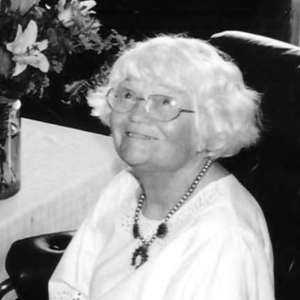 Sara Lawergren, Visby, på sin 80-årsdag år 1999.